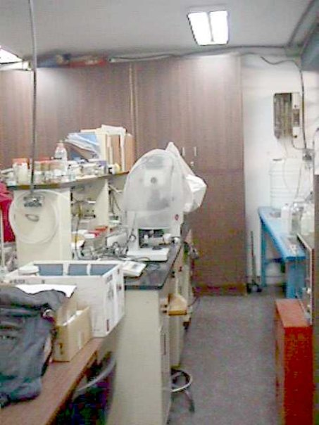 Laboratorio de Biología de Crustaceos del Instituto de Zoología Tropical hacia 2004 Universidad Central de Venezuela - Caracas - Venezuela